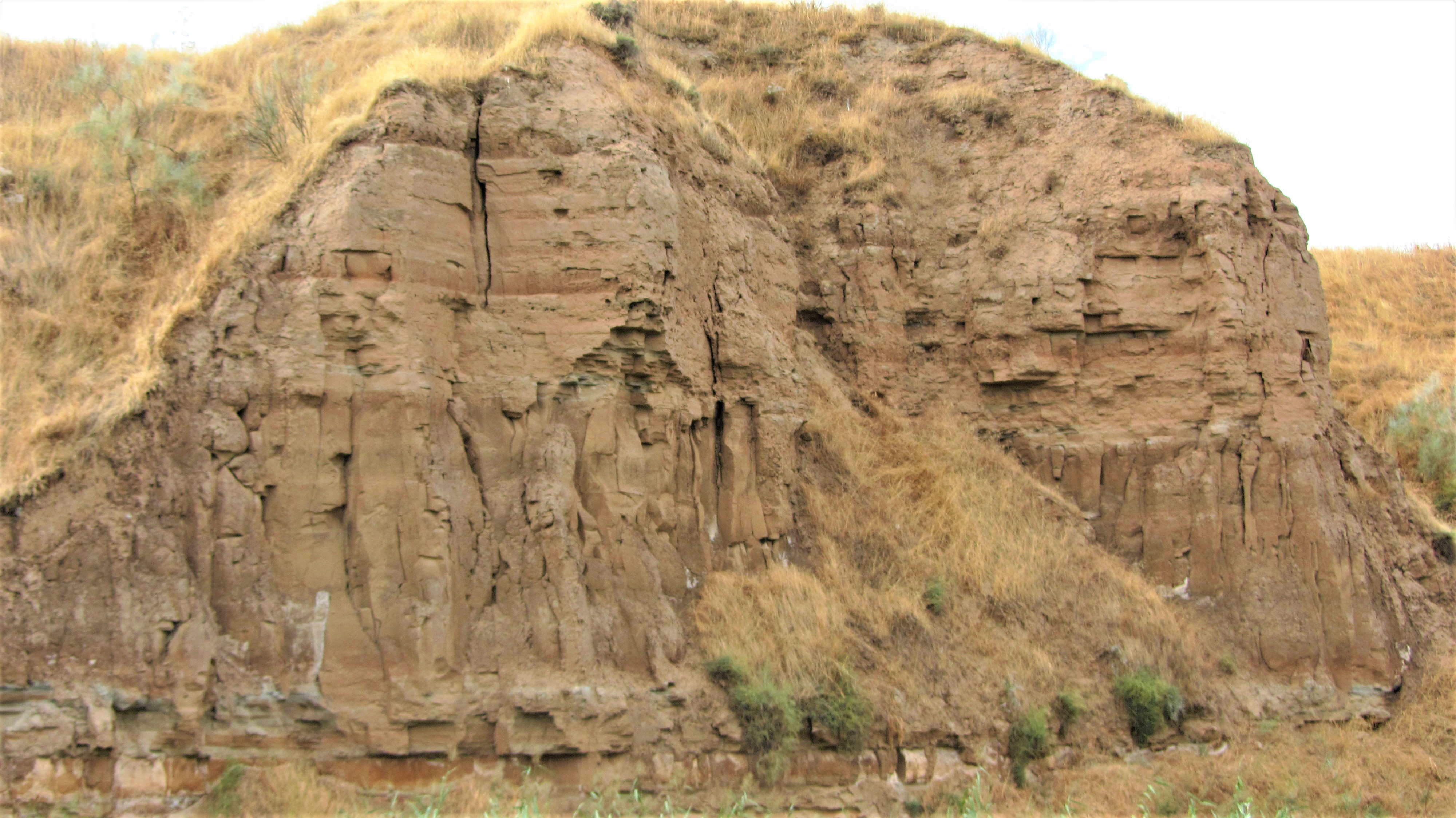 Erosión en la rivera del río Henares, a su paso por Alcalá de Henares (Comunidad de Madrid - España) en la zona denominada parque Zulema. This is a photography of a Special Area of Conservation in Spain with the ID: ES3110001. Natura2000 entry, EEA entry